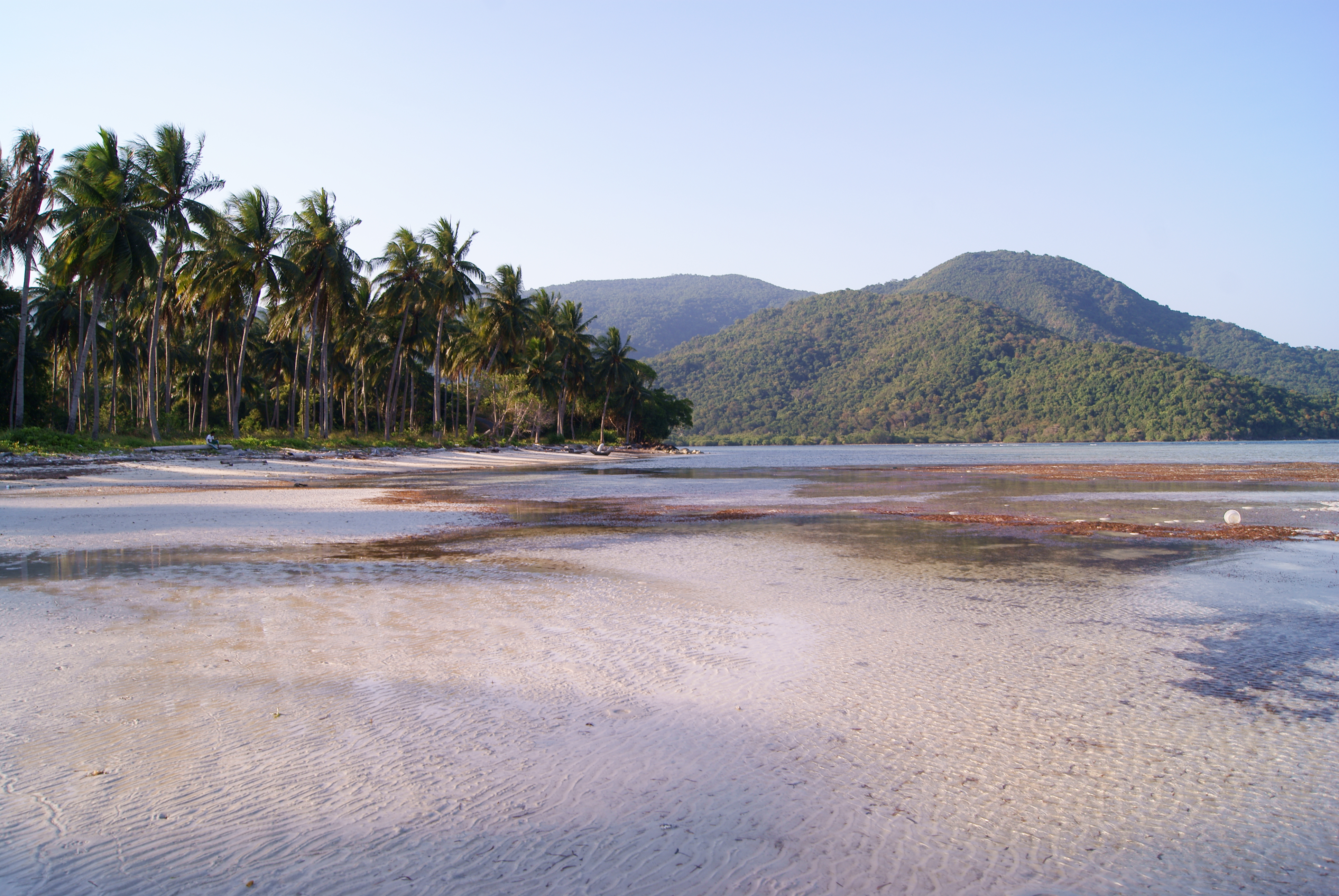 Pantai Legon Lele, Pulau Karimun Jawa